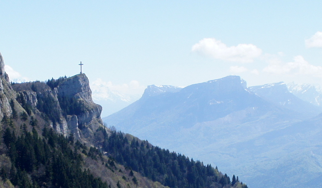 la Croix du Nivolet et, à l'arrière-plan, le Granier et la Chartreuse